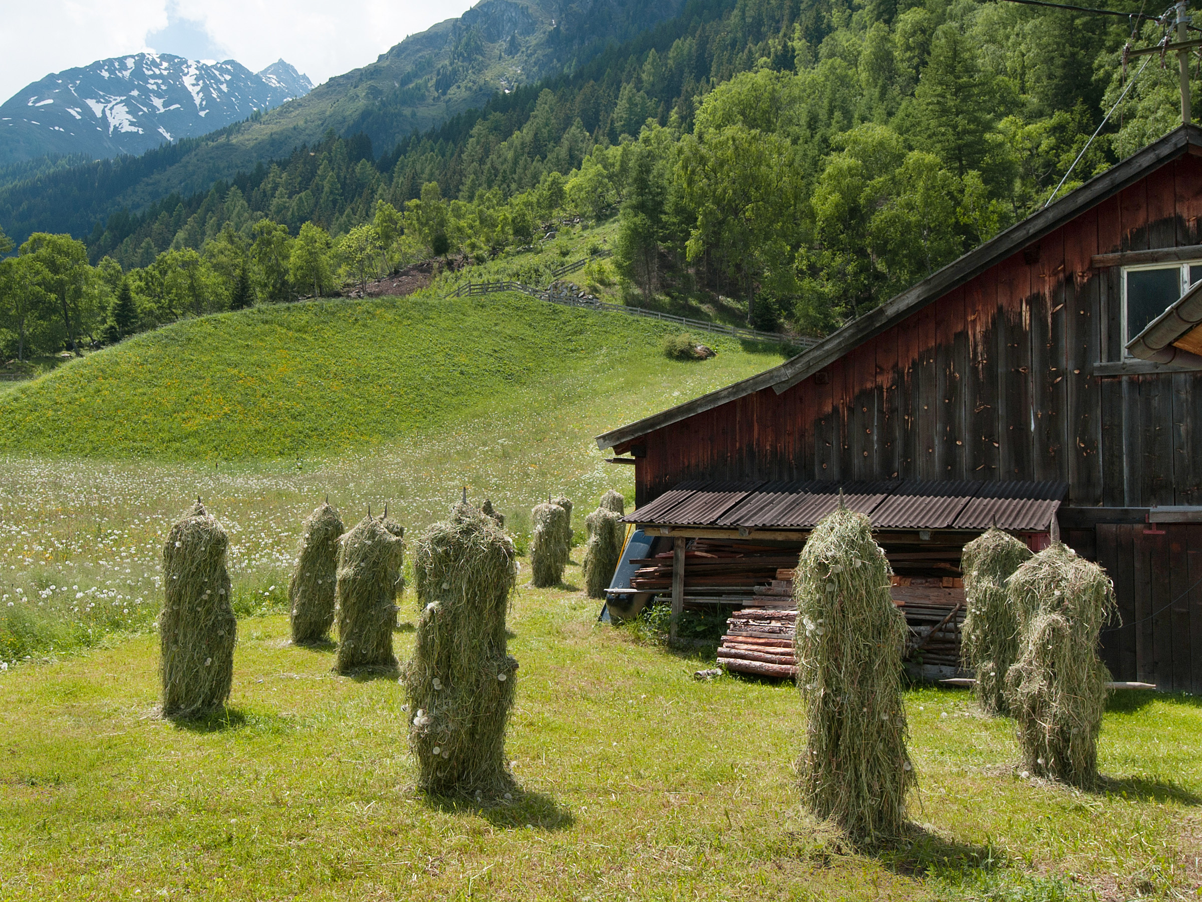 Wiki takes Nordtiroler Oberland: Heinzen in Unterastlehn, Gemeinde Längenfeld, Tirol